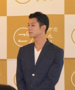 2014年、新潟ごはん祭り in銀座 にて